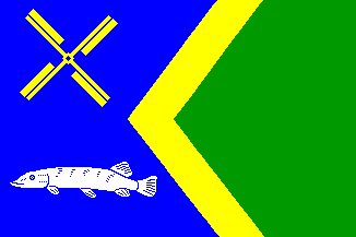 Vlag gemeente Schermer, bron